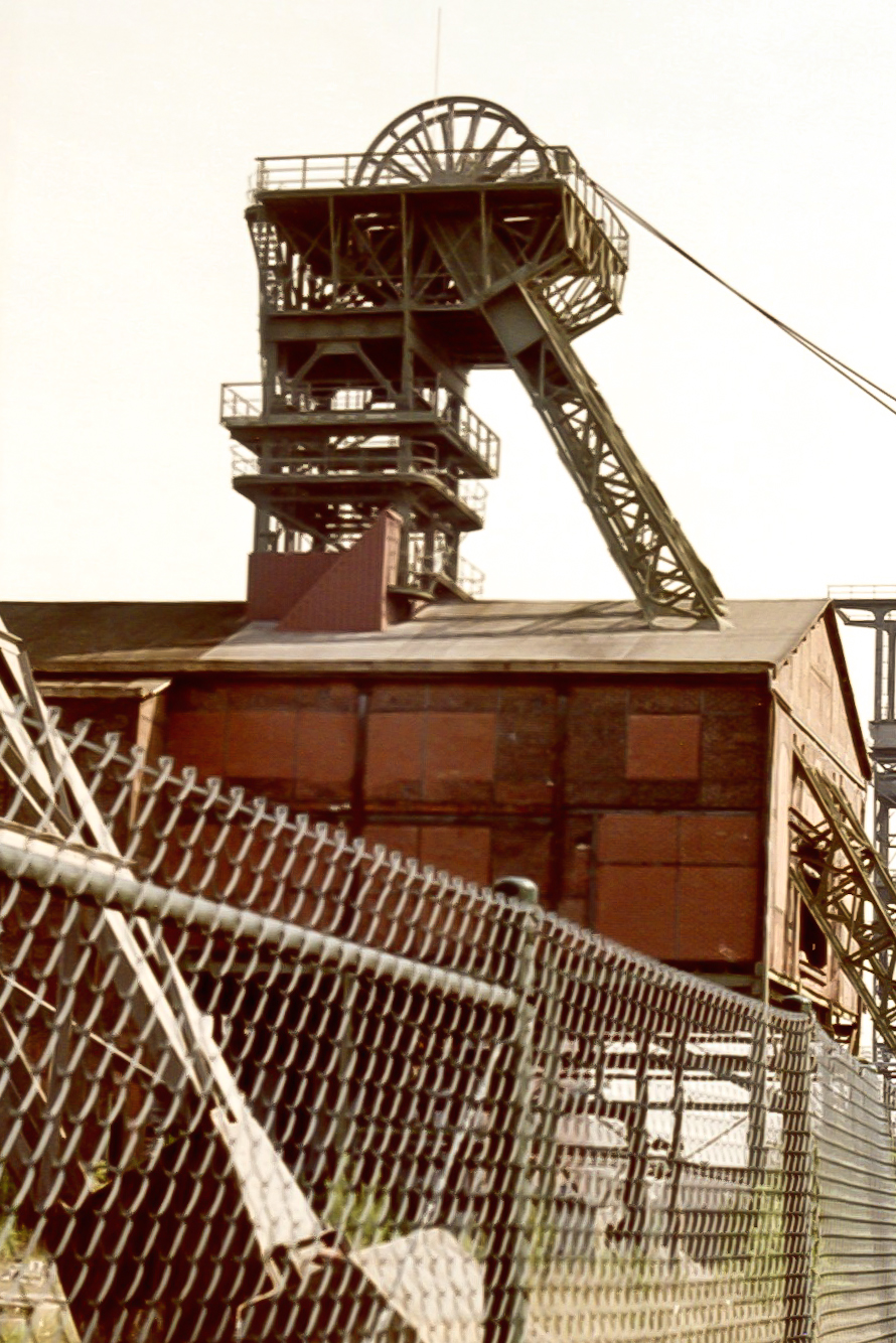 Zeche Radbod Hamm Bockum-Hövel, Deutschland.